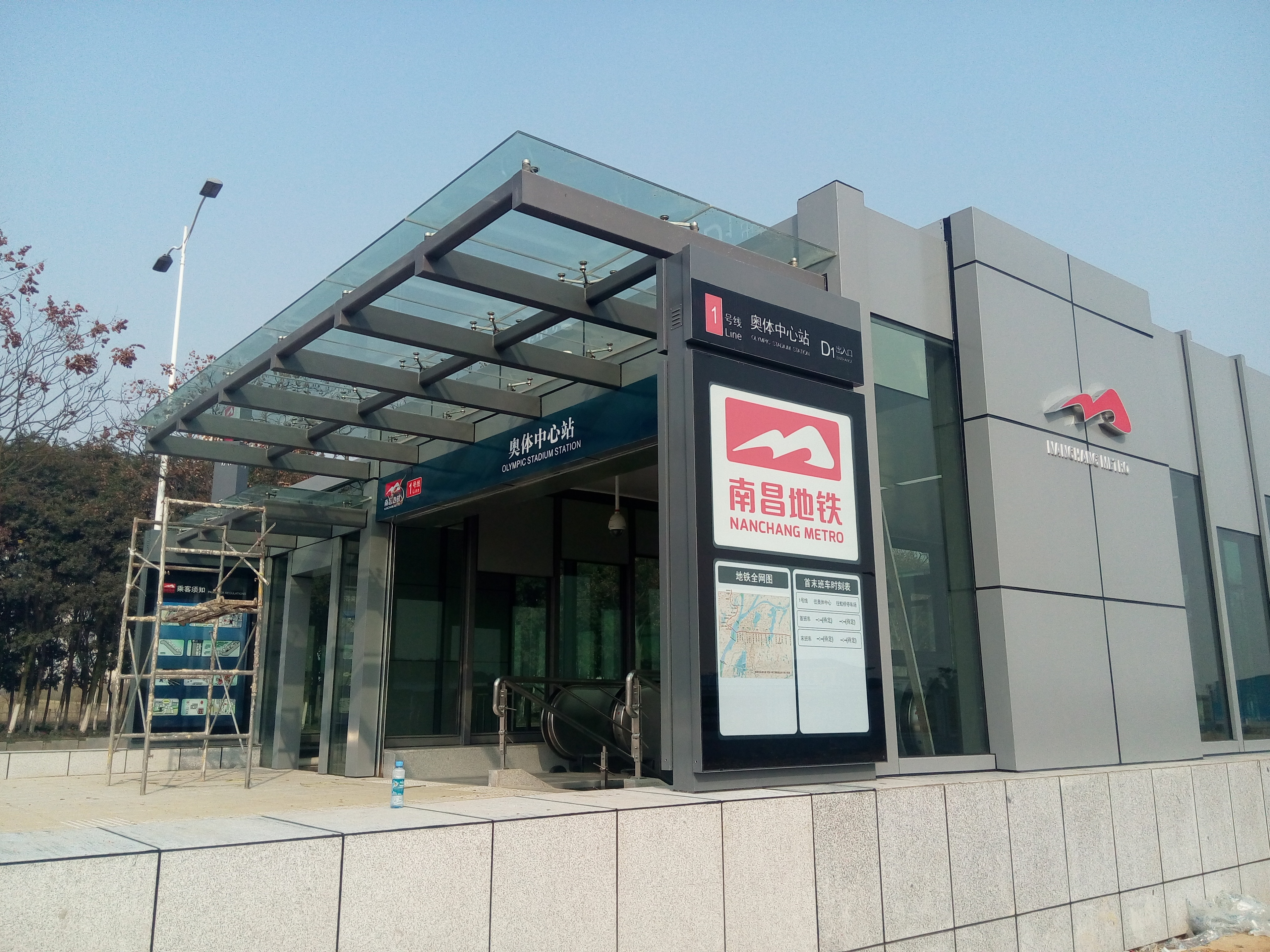 奥体中心站D1出入口